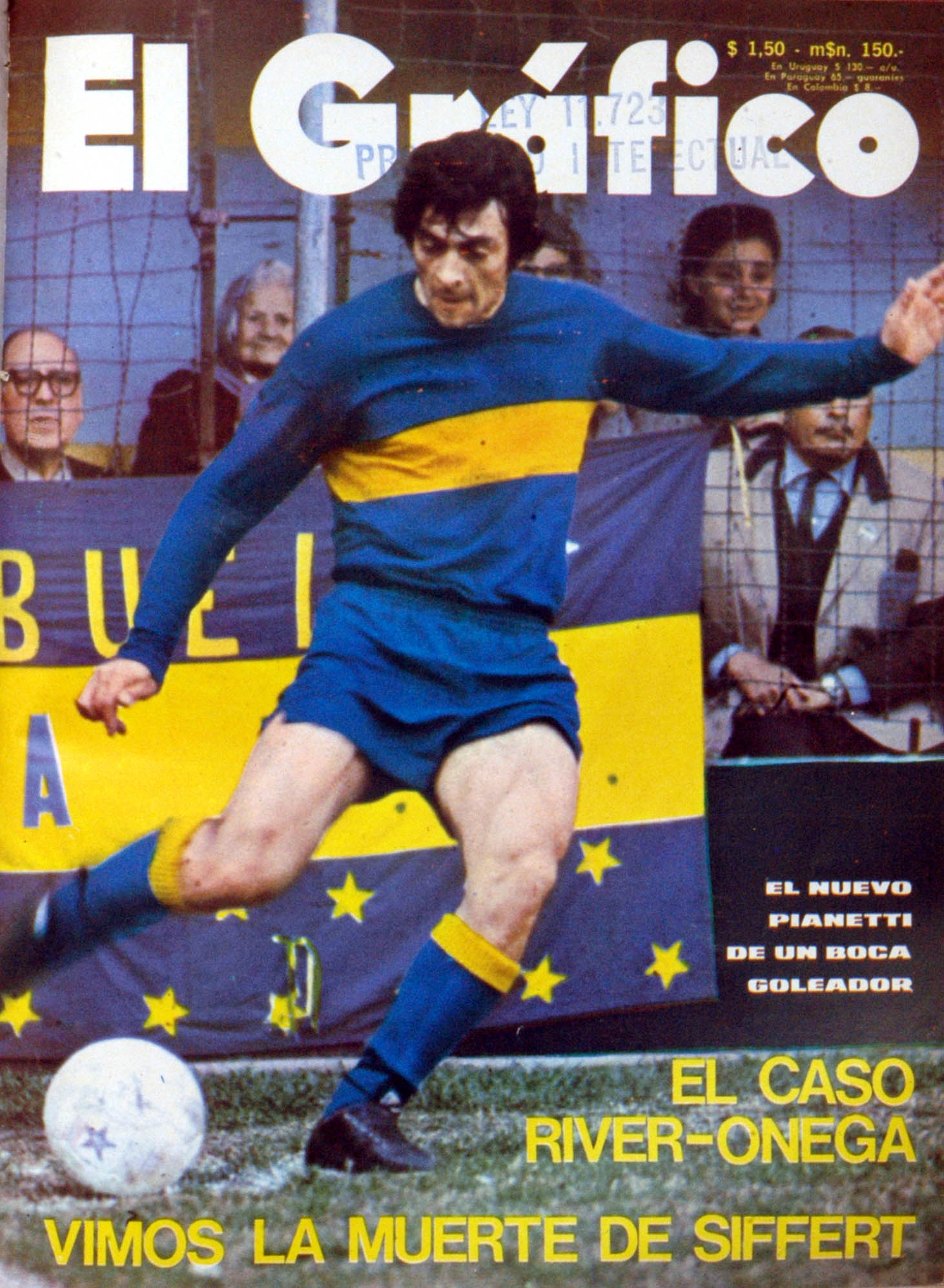 El Grafico del 26 de Octubre de 1971. Edicion 2716